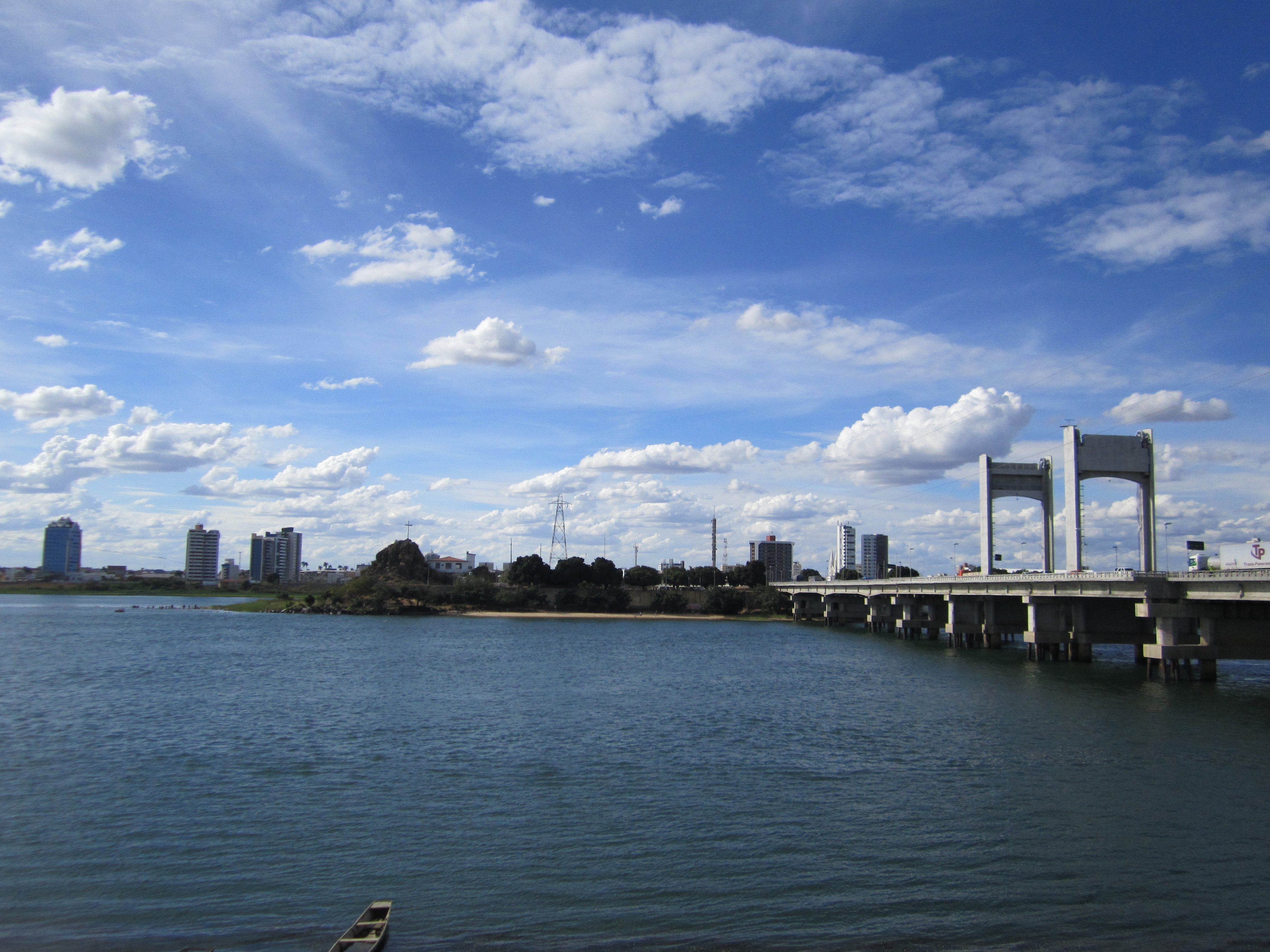 Ponte Presidente Dutra e Orlas I e II - Petrolina, Pernambuco, Brasil